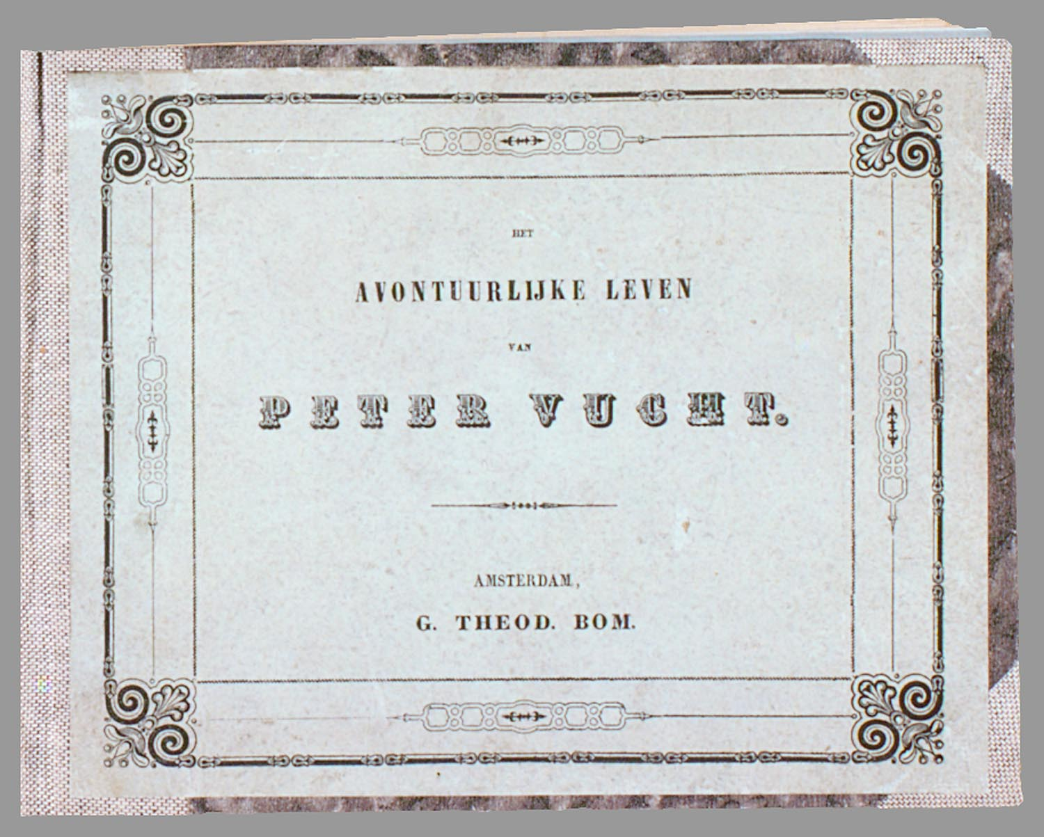 Peter Vucht maakt het met zijn streken zo bont dat hij heel wat keren ontslagen wordt. Ten slotte verdrinkt hij. Prentenboek met rijmende tekst en 10 paginagrote grappige tekeningen in de stijl van Rodolphe Töpffer (twee platen verwijzen zeer direct naar Prikkebeen) ingekleurd met heldere kleuren. 20 p : handgekl. houtgrav // Datering: niet in Brinkman; uitgever werkzaam van 1840-1884, schatting // De platen hebben signaturen als: Spiers of Spyers, van Arum, F. & H. Verveer, J.W.A.H. en J.W.A. Hilverdink. Twee platen zijn afkomstig van Rodolphe Töpffer // De keerzijde der illustraties is onbedrukt Rijmvertellingen // Schelmenverhalen // Prentenboeken